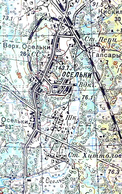 План деревень Верхние Осельки, Нижние Осельки и посёлка Осельки. 1939 г.